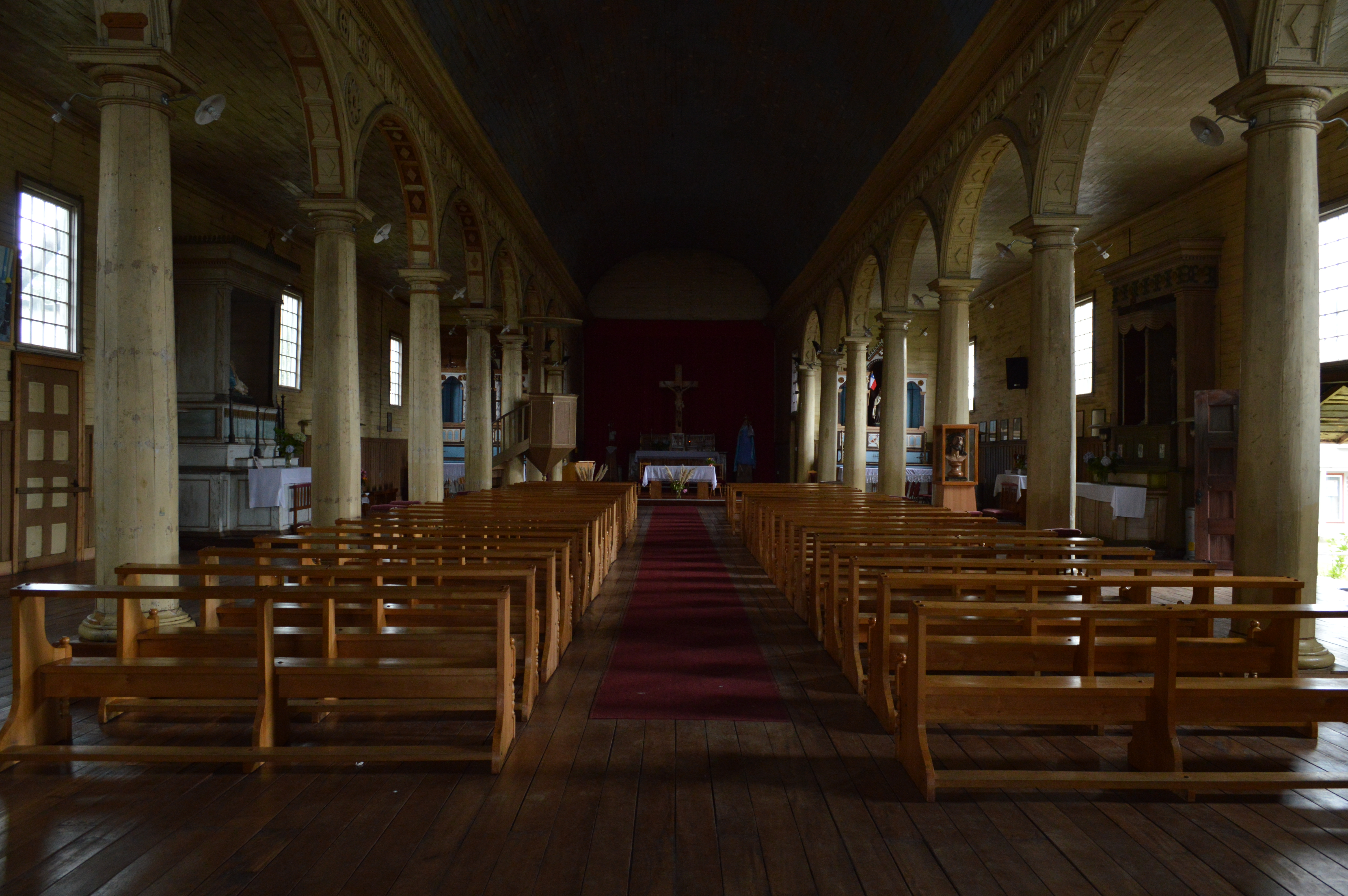 Vista general.